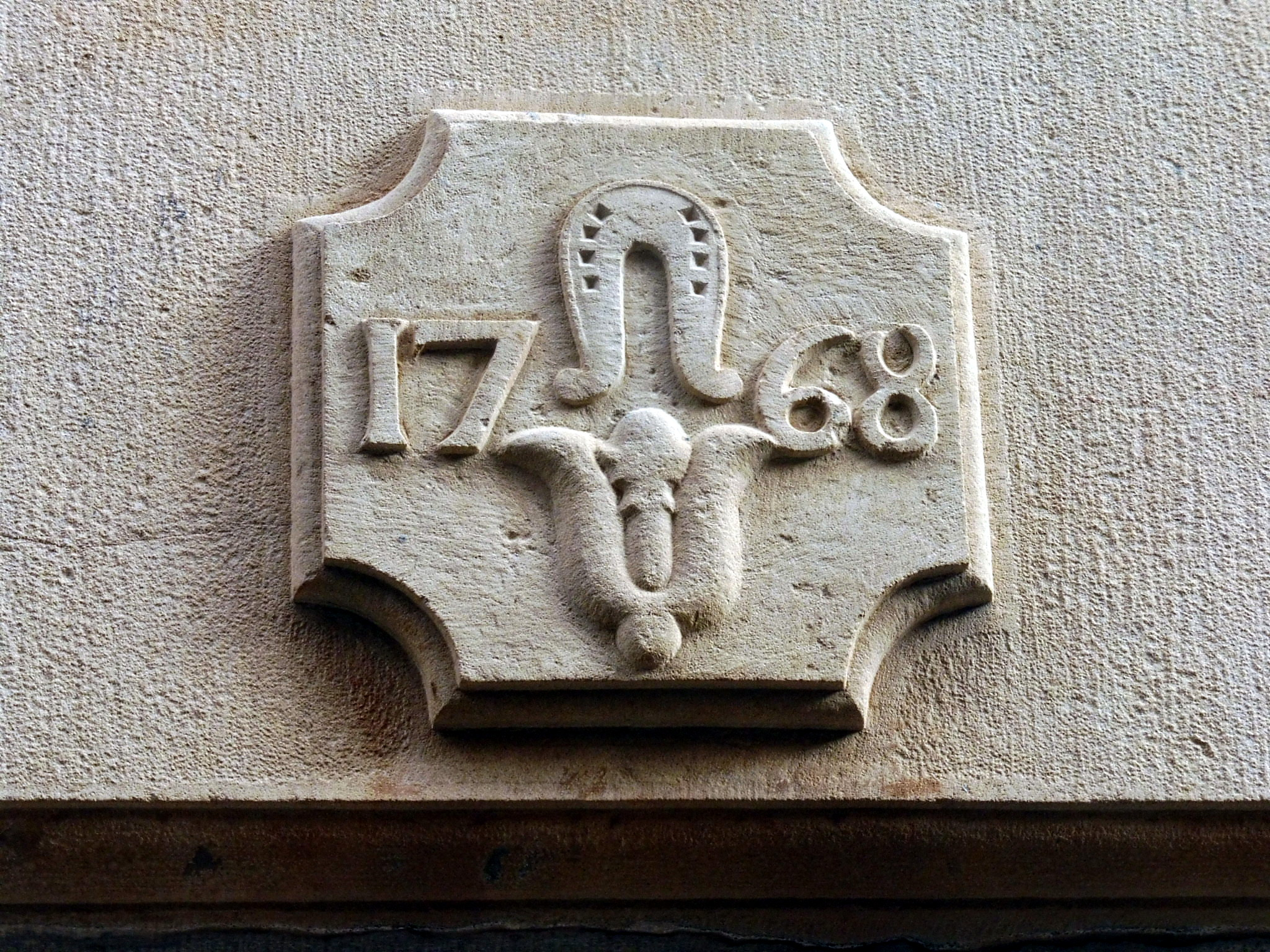 Cal Comte (Granyena de Segarra): relleu a la llinda del portal